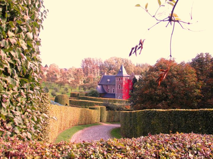 Mottevallei in Borgloon - eigen foto